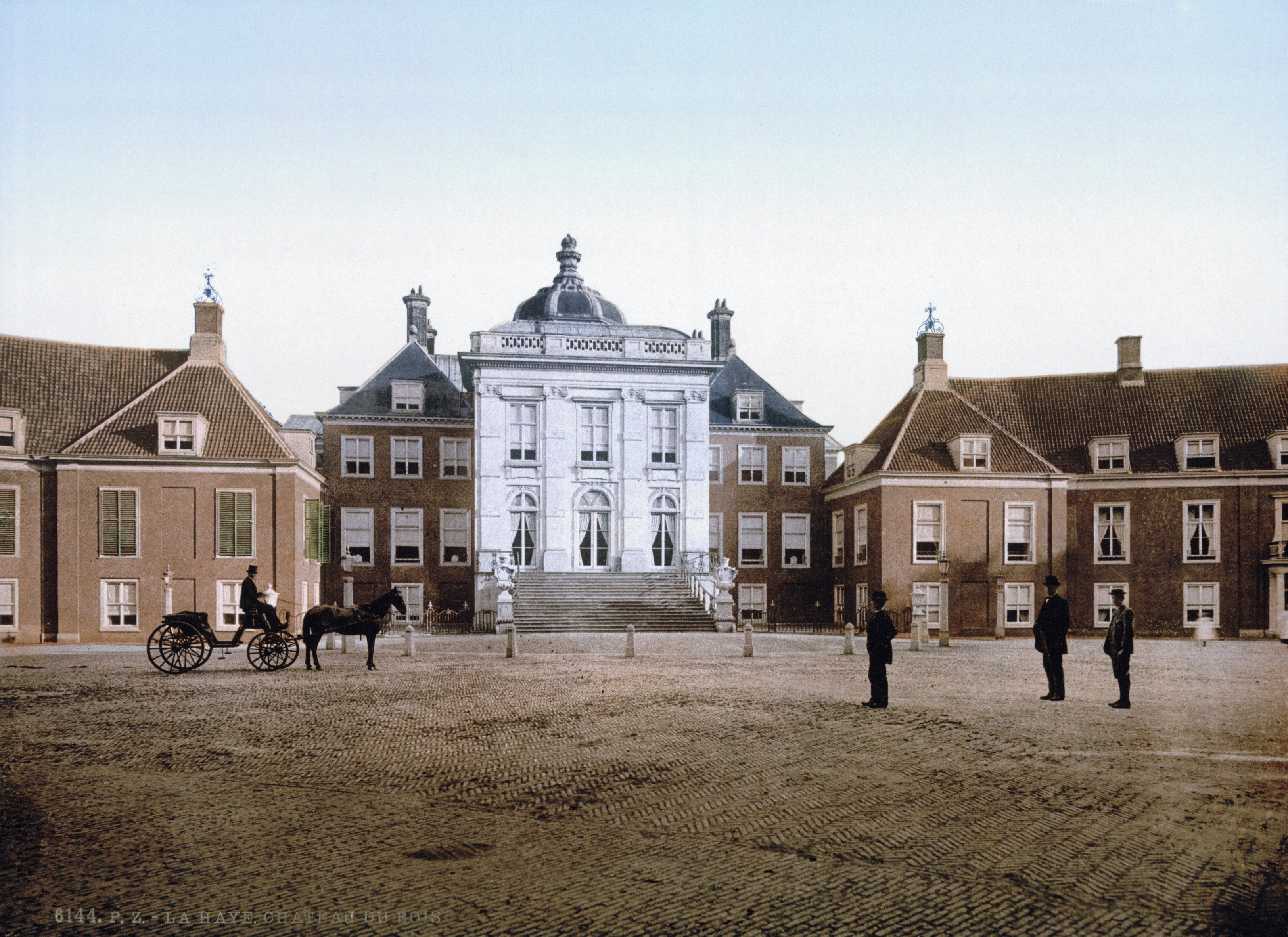 Den Haag - Huis Ten Bosch